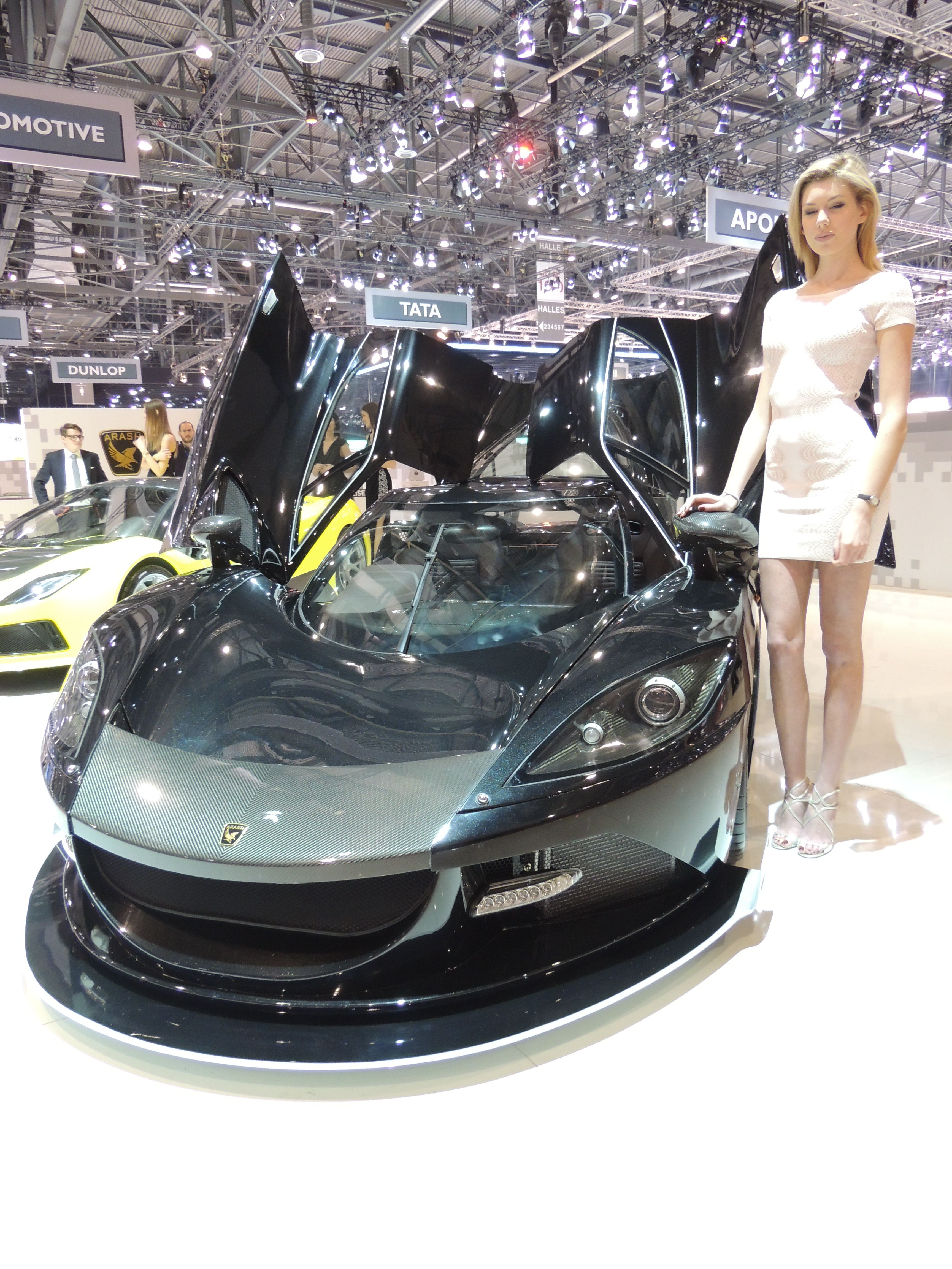 Arash AF10, salon de Genève 2016